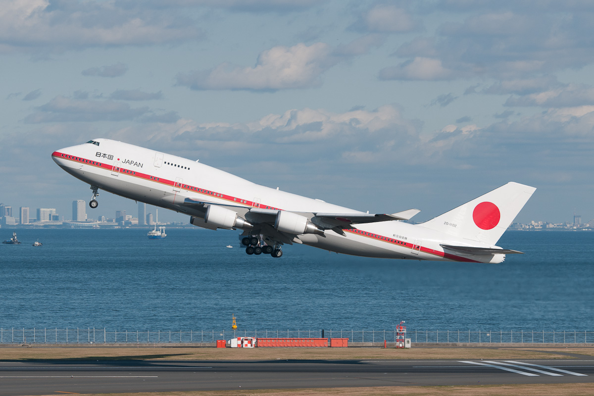 羽田空港を離陸する日本国政府専用機（20-1102）。